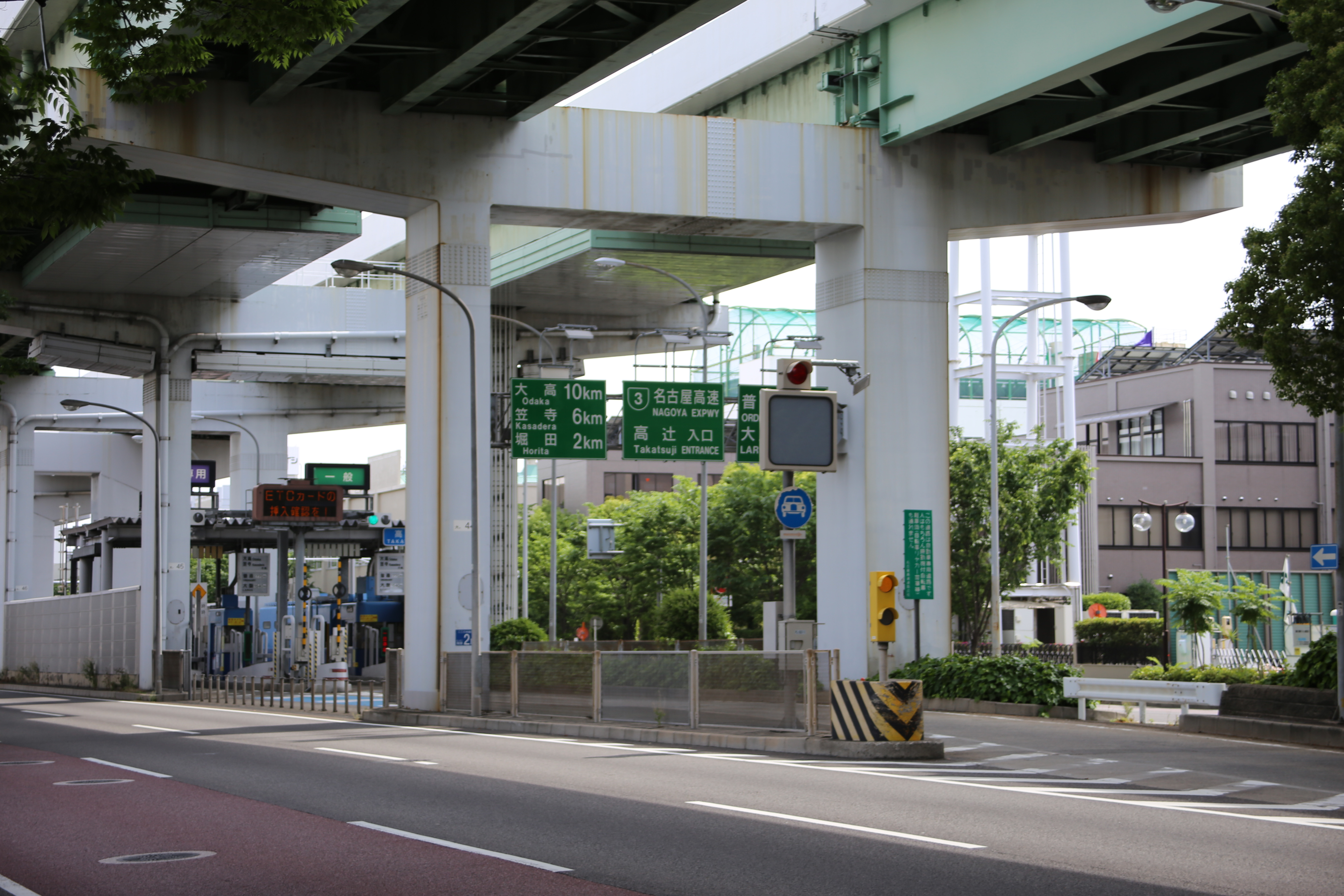 名古屋市瑞穂区堀田通の名古屋高速3号大高線高辻入口を北東側より撮影